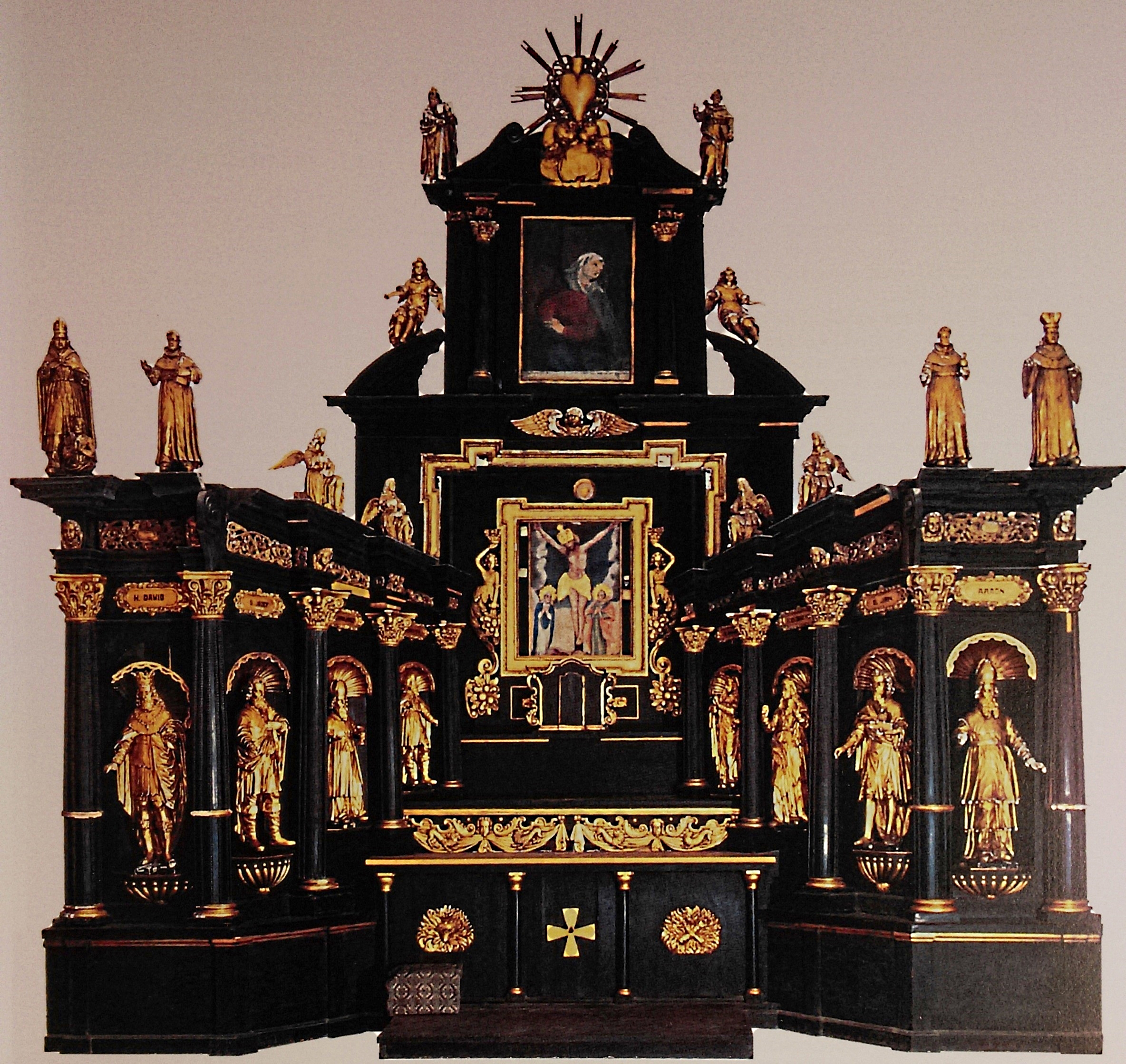 Галоўны алтар Касцёла Унебаўзяцця Найсвяцейшай Дзевы Марыі ў Будславе. Дрэва, разьба, пазалота. 717 х 634 х 234. Пабудаваны ў касцёле бернардзінцаў у 1649 годзе. Разьбяр Пётр Грамель, пазалотчыкі Геранім Плонскі, Бенедыкт Росман. Выяўлены 30-й экспедыцыяй Дзяржаўнага мастацкага музея БССР у 1976 годзе.